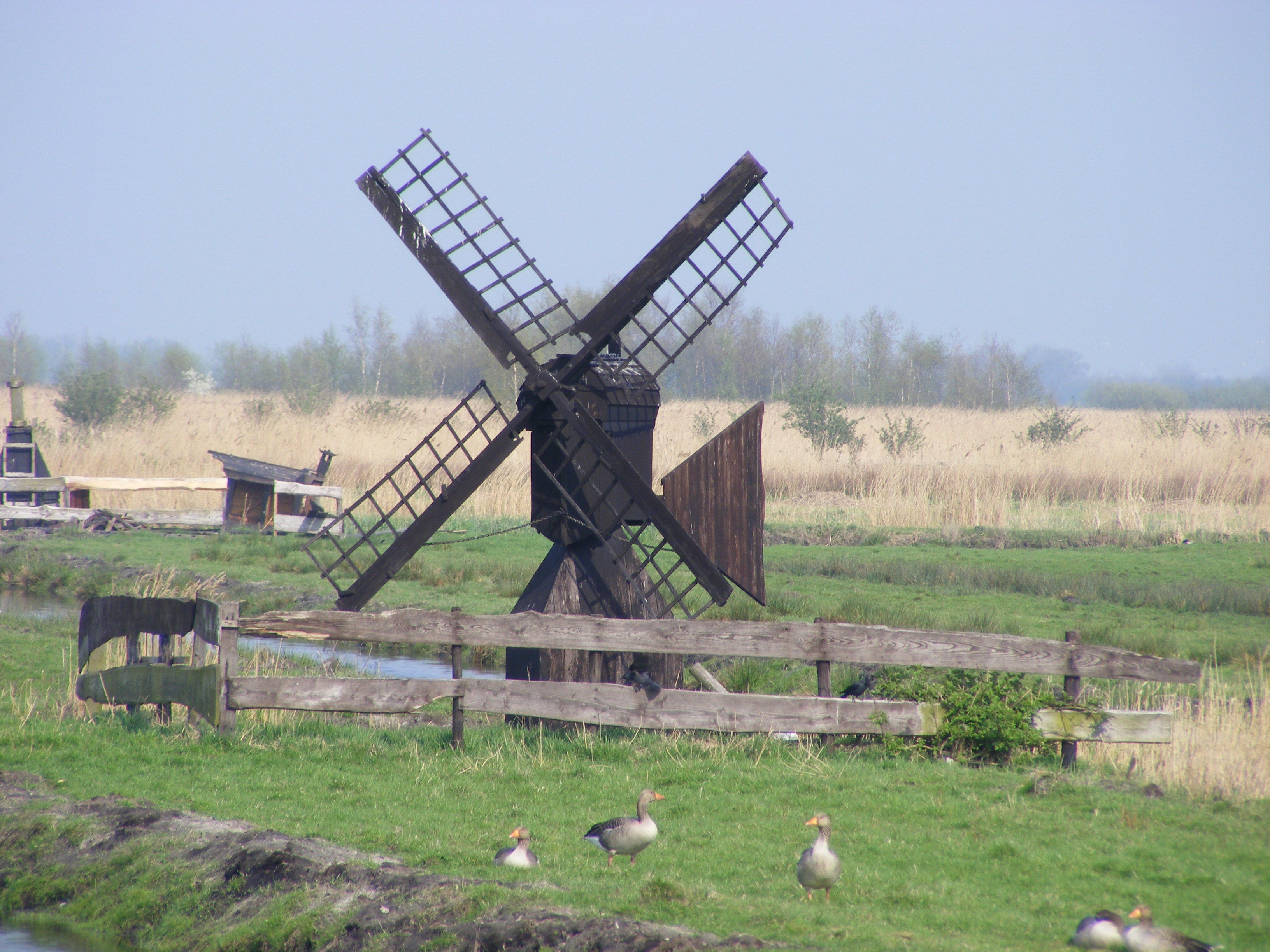 Weidemolen 'De Kaatmolen' gelegen in de Kalverpolder (Kalverringdijk) aan de Zaanse Schans